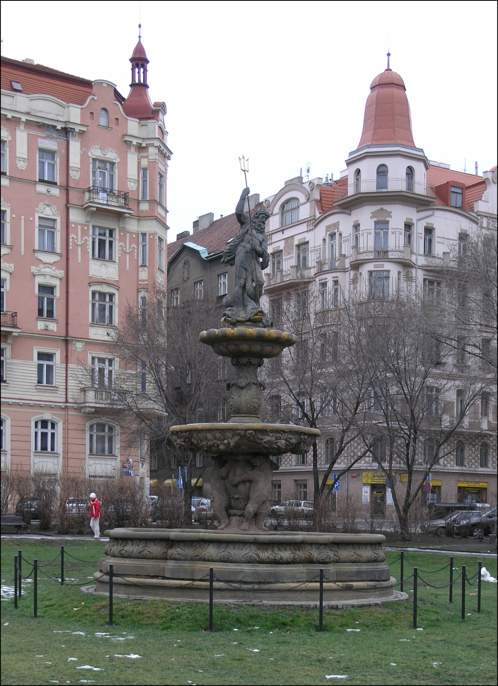 Náměstí 14. října - Medvědí fontána